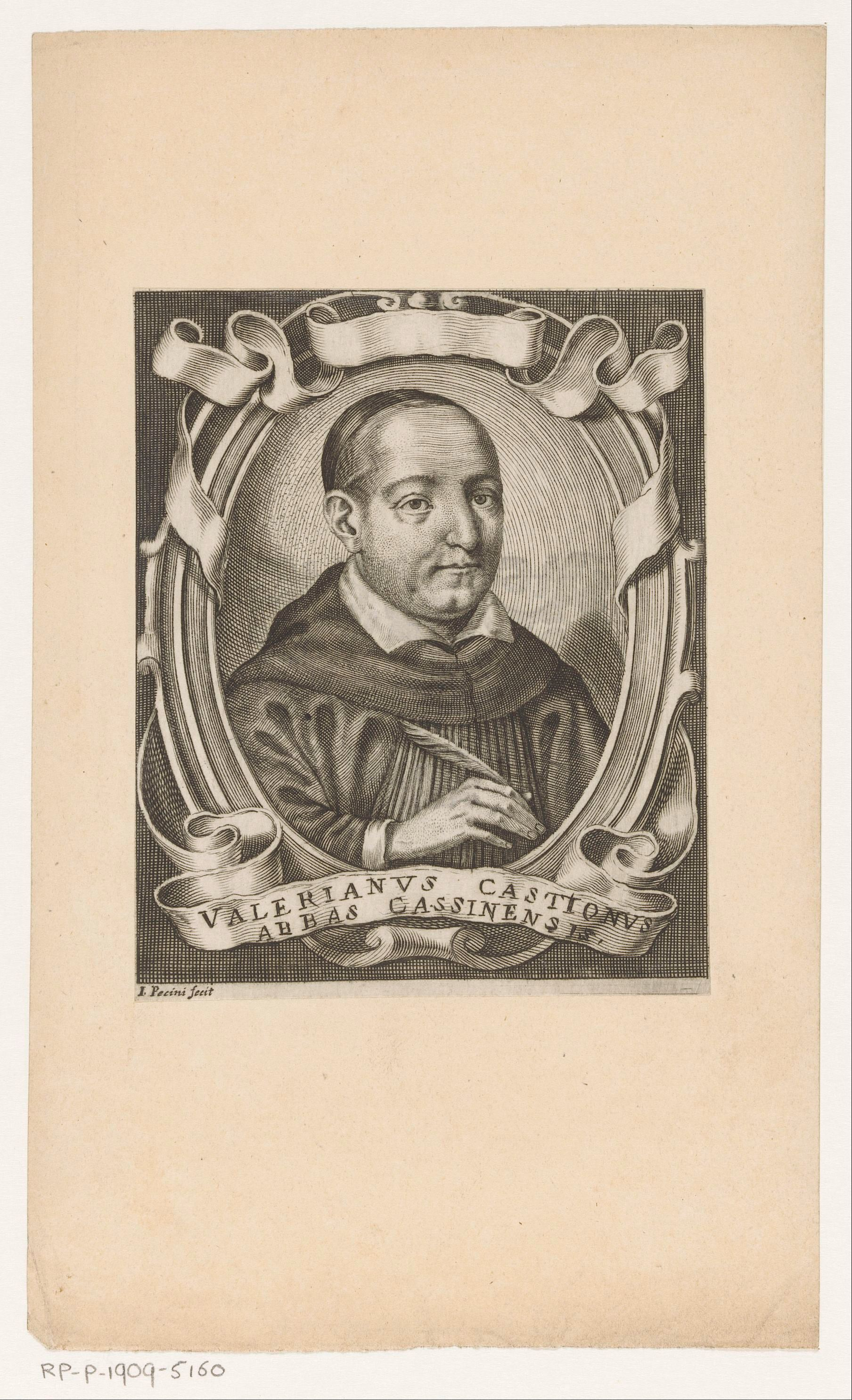 IdentificatieTitel(s): Portret van schrijver Valeriano CastiglioneObjecttype: prent boekillustratie Objectnummer: RP-P-1909-5160Opschriften / Merken: verzamelaarsmerk, verso, gestempeld: Lugt 2228VervaardigingVervaardiger: prentmaker: Giacomo Piccini (vermeld op object)uitgever: Francesco ValvasensePlaats vervaardiging: VenetiëDatering: 1647Fysieke kenmerken: gravureMateriaal: papier Techniek: graveren (drukprocedé)Afmetingen: blad: h 120 mm (Binnen plaatrand afgesneden.) × b 96 mm (Binnen plaatrand afgesneden.)ToelichtingPrent gebruikt voor de publicatie: Loredan, Giovan Francesco. Le glorie degli Incogniti. Venetië: Francesco Valvasense, 1647, p. 420.OnderwerpWat: historical personsportrait of a writerWie: Valeriano CastiglioneVerwerving en rechtenVerwerving: aankoop 1905Copyright: Publiek domein